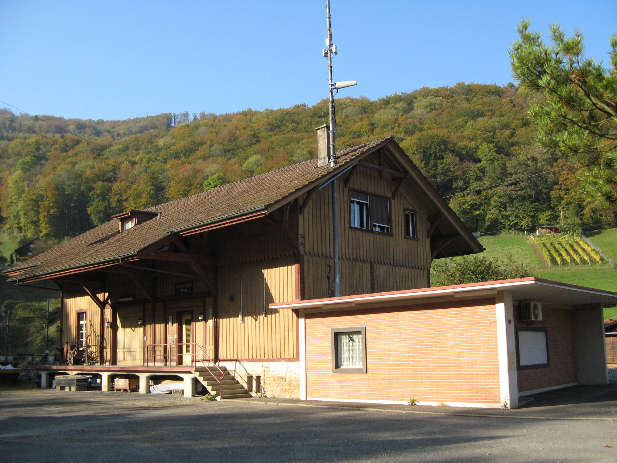 Bahnhof Schinznach-Dorf, seit 1993 geschlossen